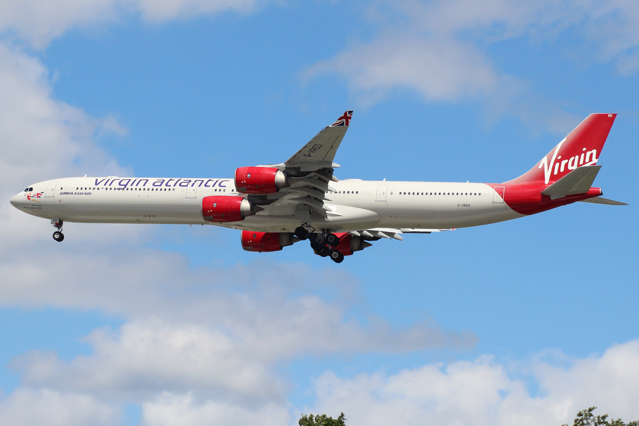 G-VRED A340-600 Virgin